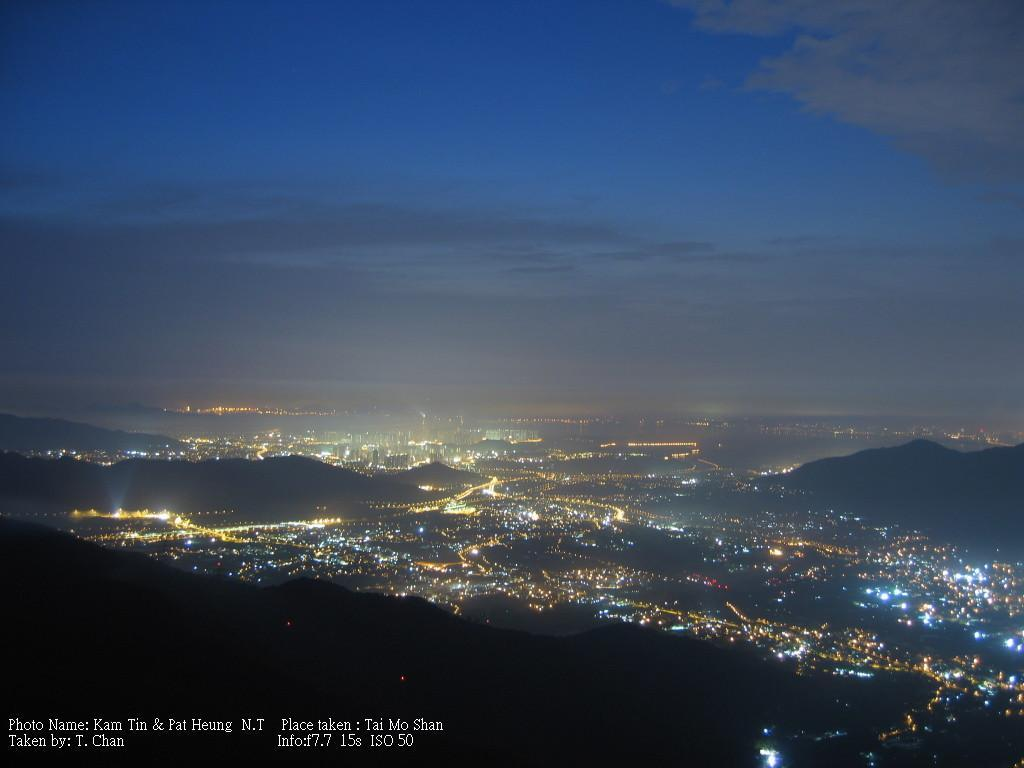 錦田及八鄉夜景 大帽山攝